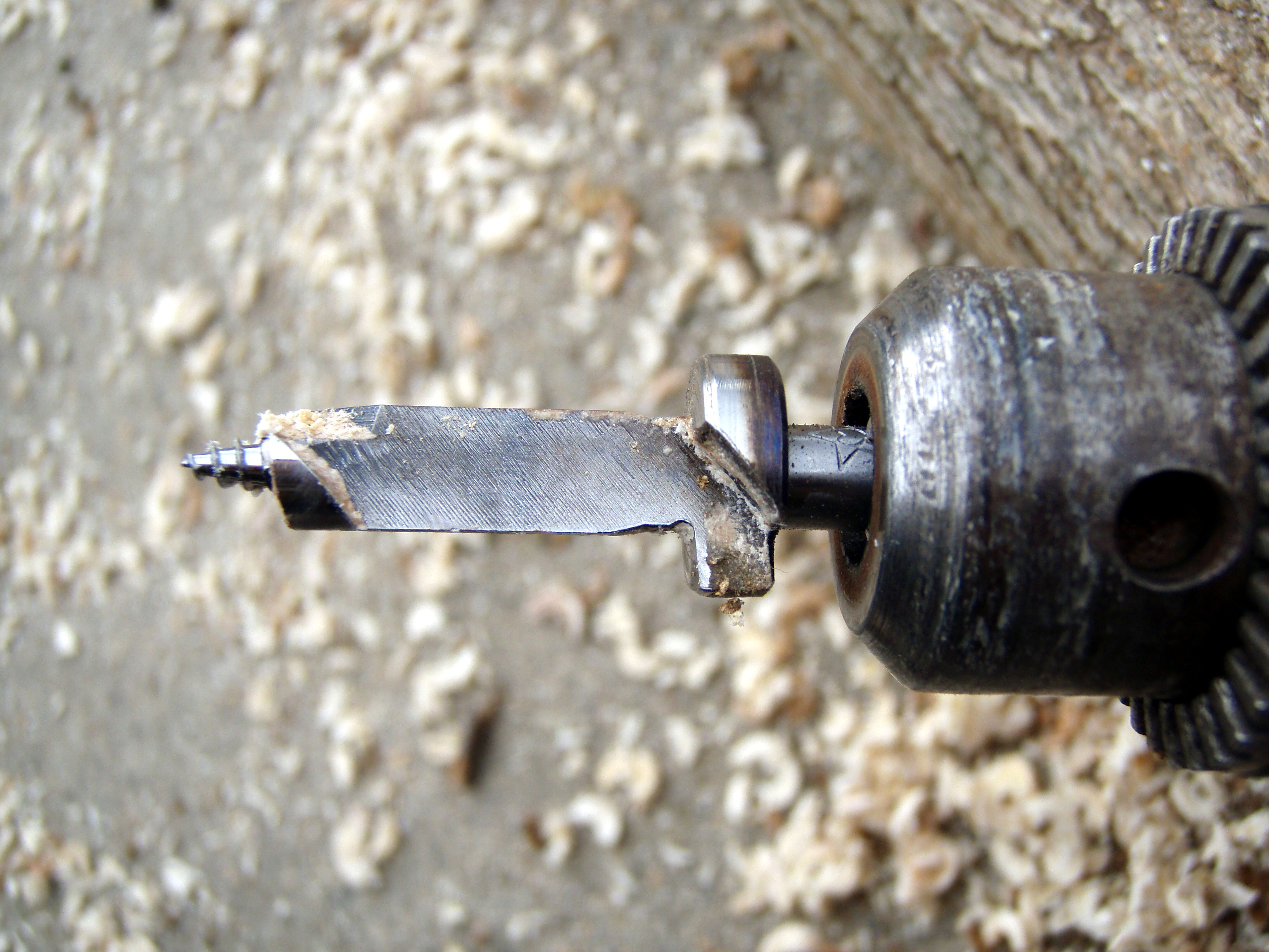 原木の穿孔用ドリルビット